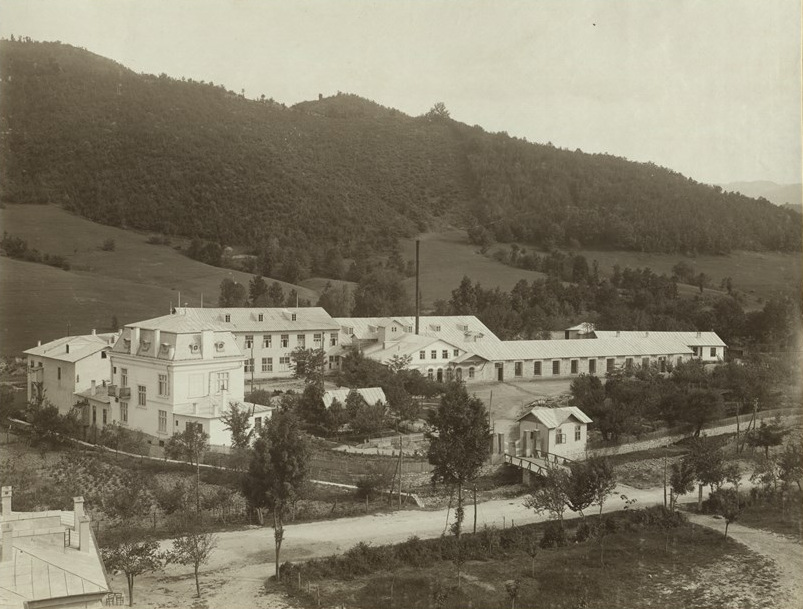 Първа българска концесионирана фабрика за ленени, конопени платове и привилегирована предачница за лен на Георги Т. Рашеев в Габрово. Основана в 1902 г. Фотоалбум с фотографии на български индустриални предприятия от периода 1887-1912 г., подарен от Съюза на българските индустриалци на цар Фердинанд І по случай 25-годишнината от възшествието му на българския престол.